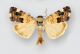 Acontia albifusa male